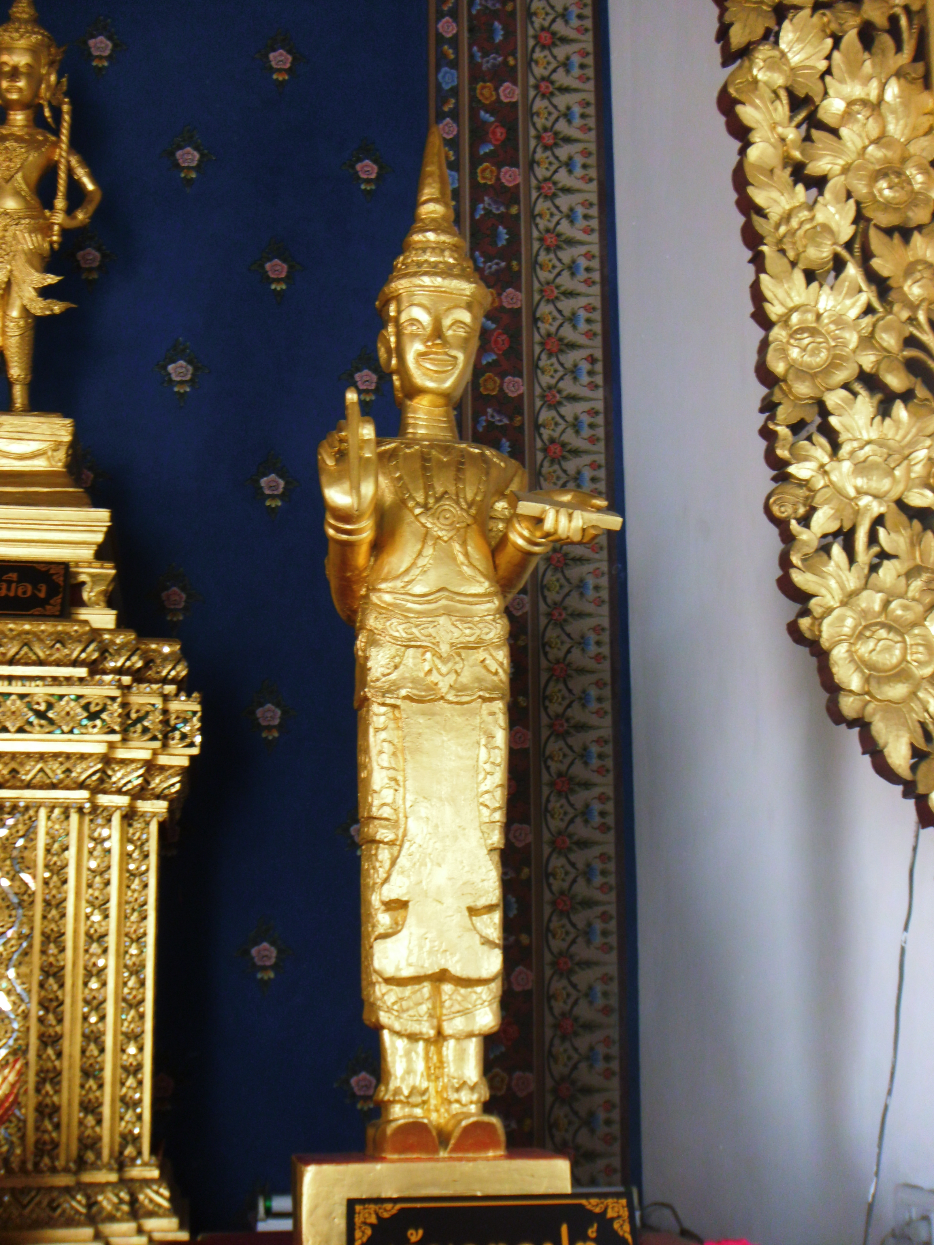 ศาลหลักเมือง